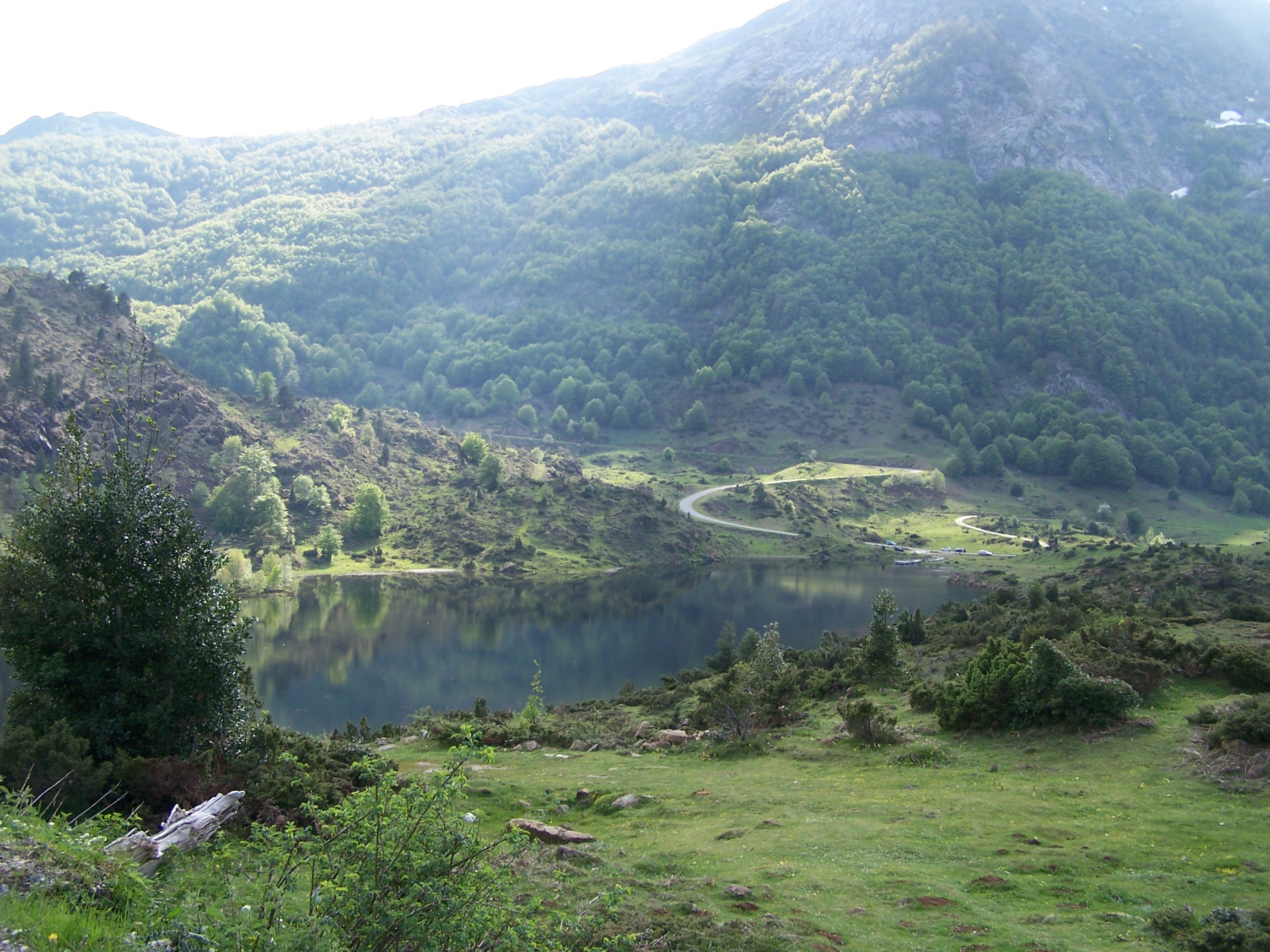 L'étang de Lers (Le Port, Ariège) et la route d'Aulus-les-Bains.